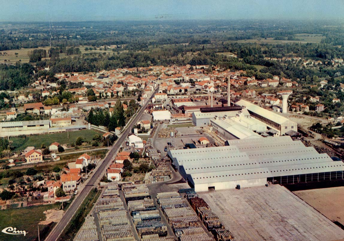 Puy-Guillaume